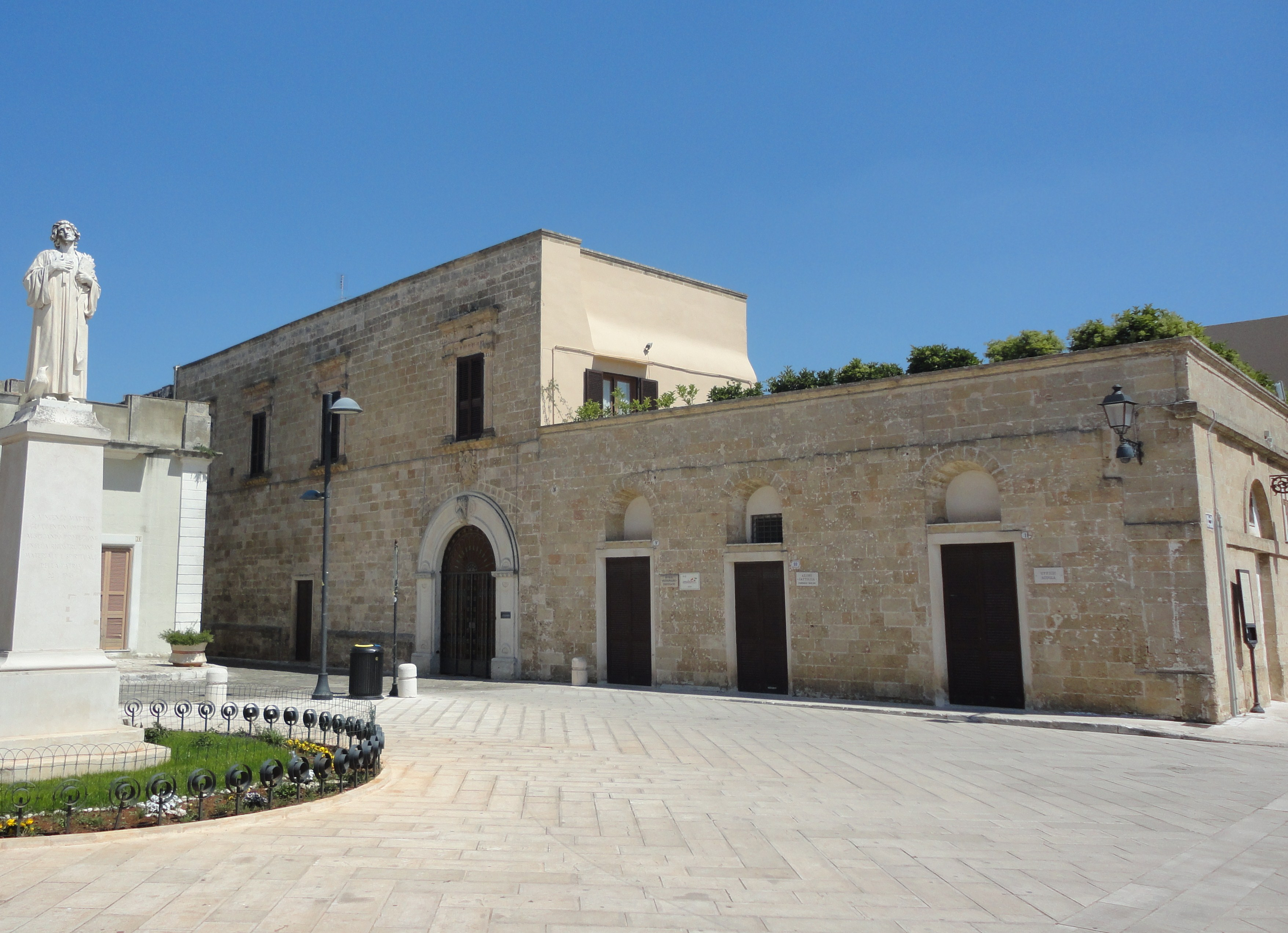 Palazzo Vescovile di Ugento, Lecce, Puglia, Italy